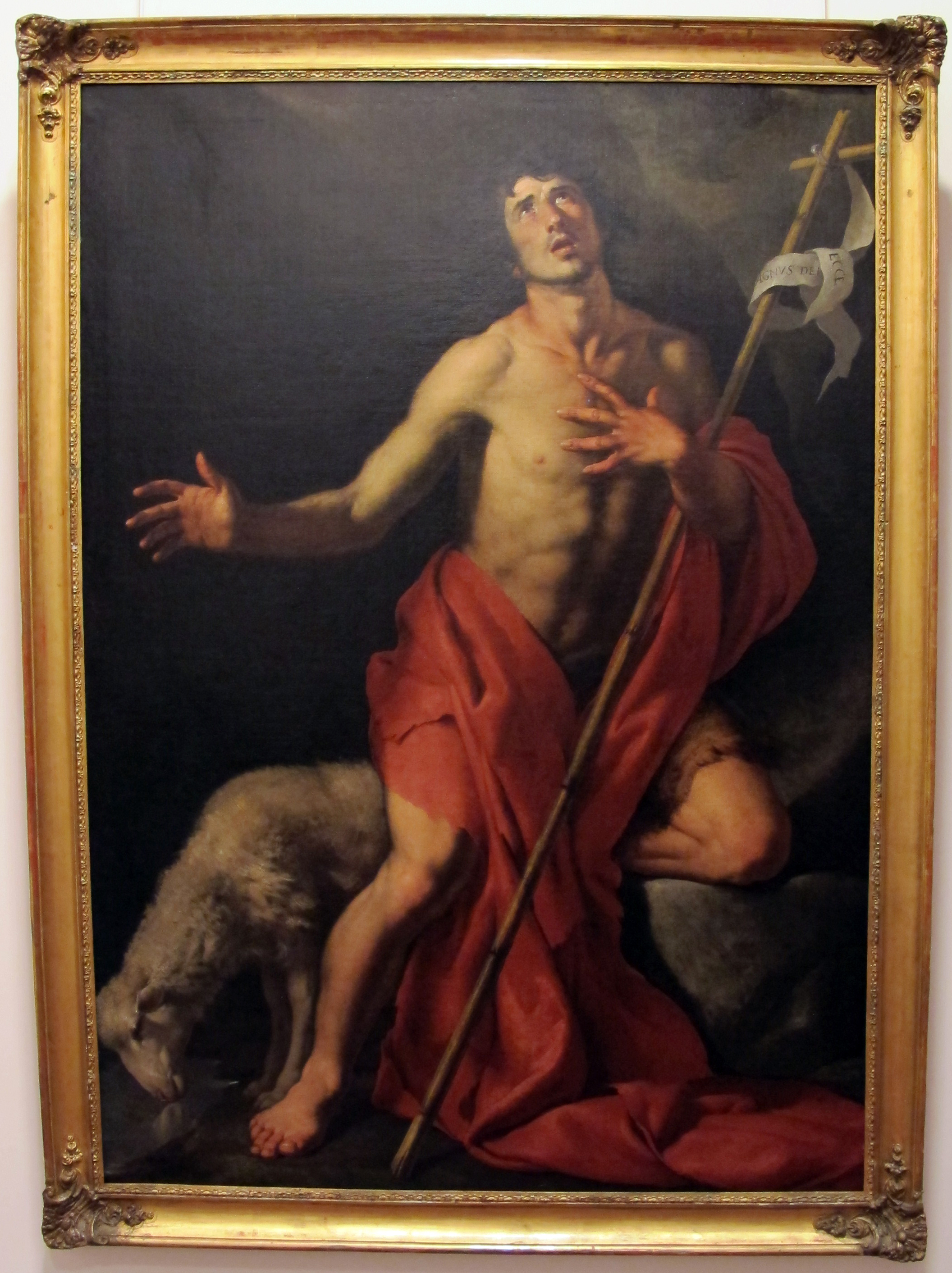 Galleria Napoletana (Museo di Capodimonte)